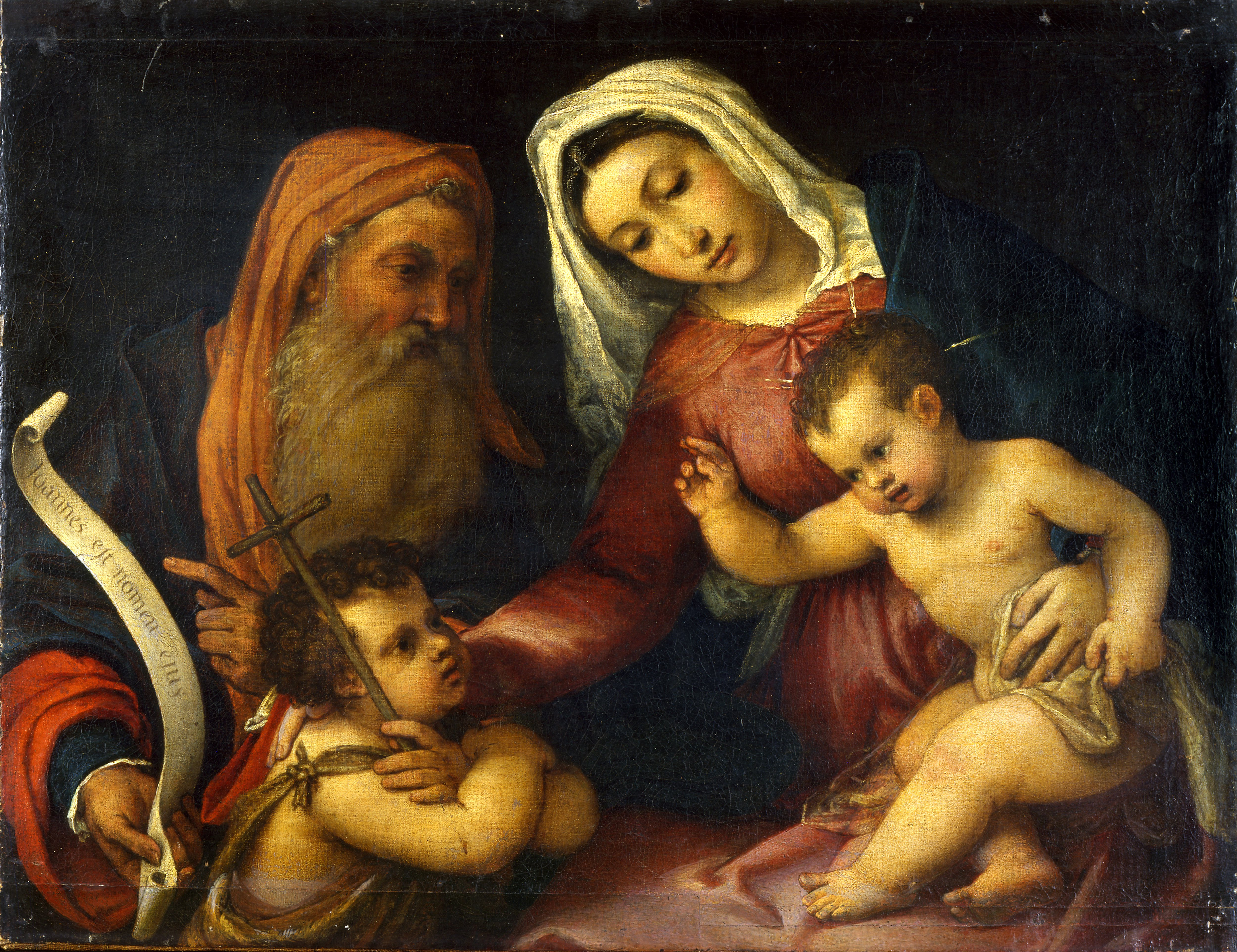 Лоренцо Лотто, Мадонна з немовлям, Іваном Хрестителем дитиною і св. Захарієм, 1546 р., Музей Польді-Пеццолі, Мілан.